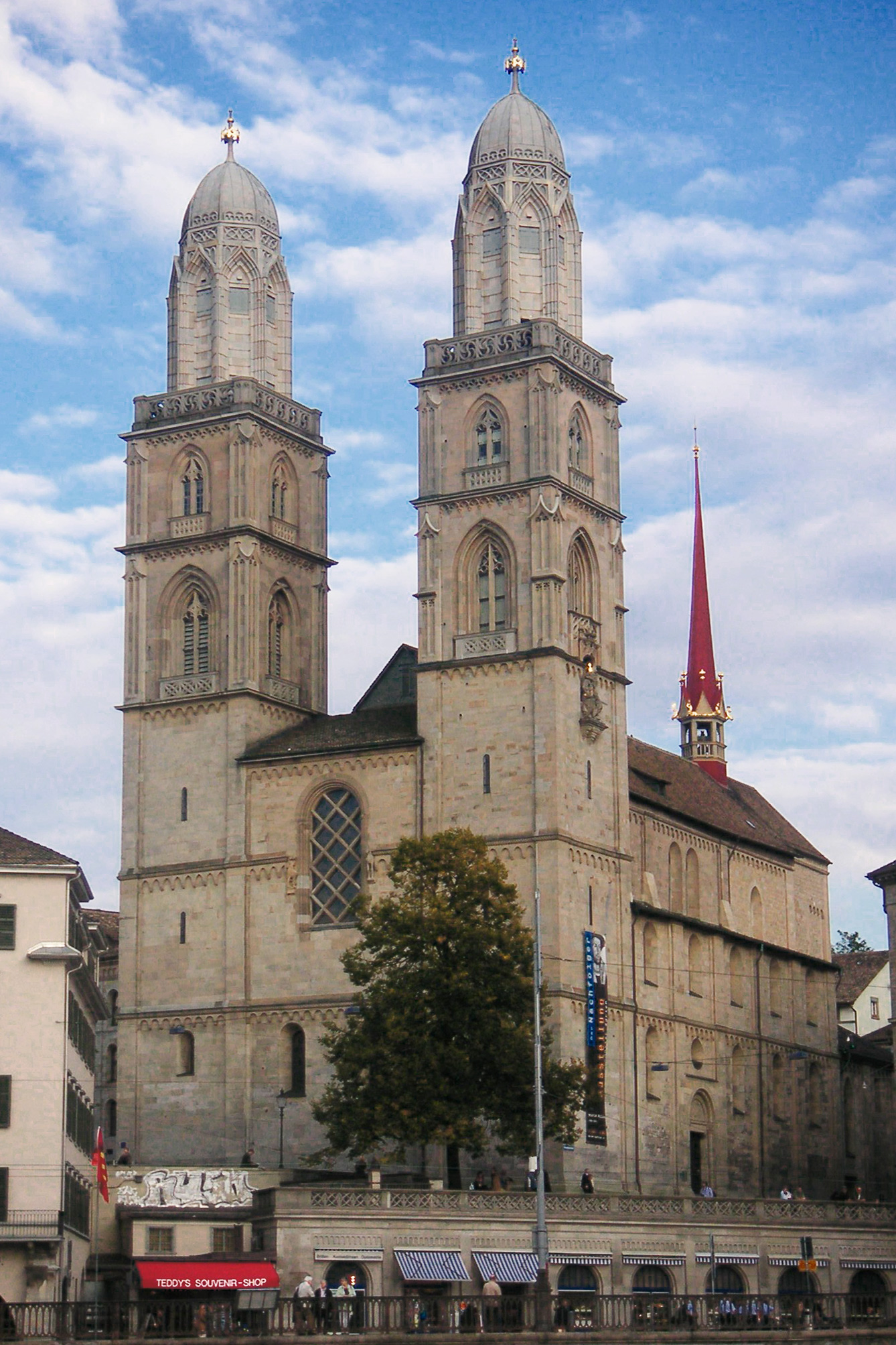 Grossmünster church in Zurich. Taken by me (User:Paranoid) in 2004.